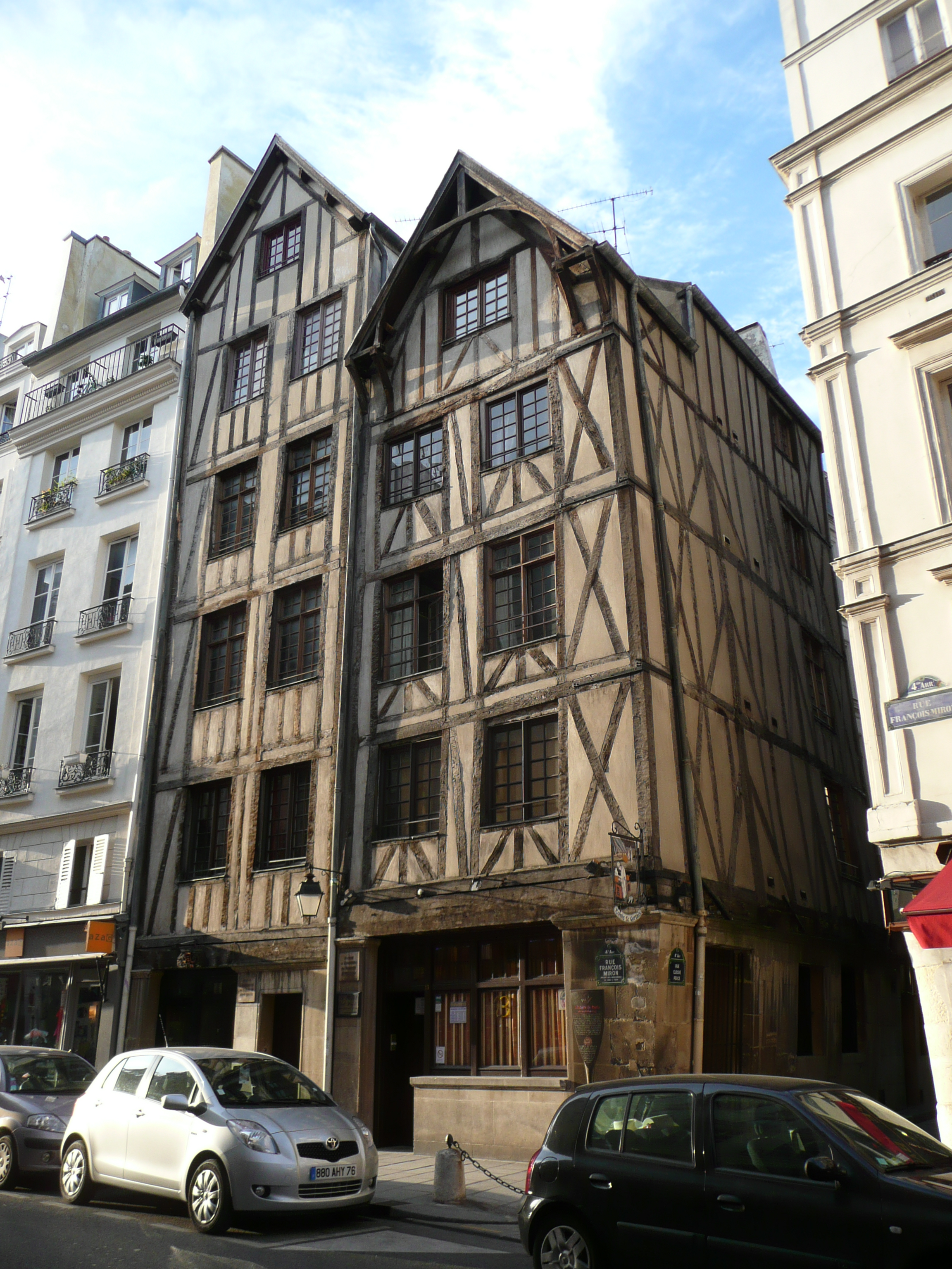 11 et 13, rue François-Miron - Paris (IVe arrondissement - Quartier du Marais) La demeure du n° 11 est à l'enseigne du Faucheur et celle du n° 13 à l'enseigne du Mouton. Elles sont documentées au tout « début du XVIe siècle », mais peut-être étaient-elles primitivement « du XIVe siècle ». C'est du moins ce que l'on peut lire sur le panneau de la ville de Paris.